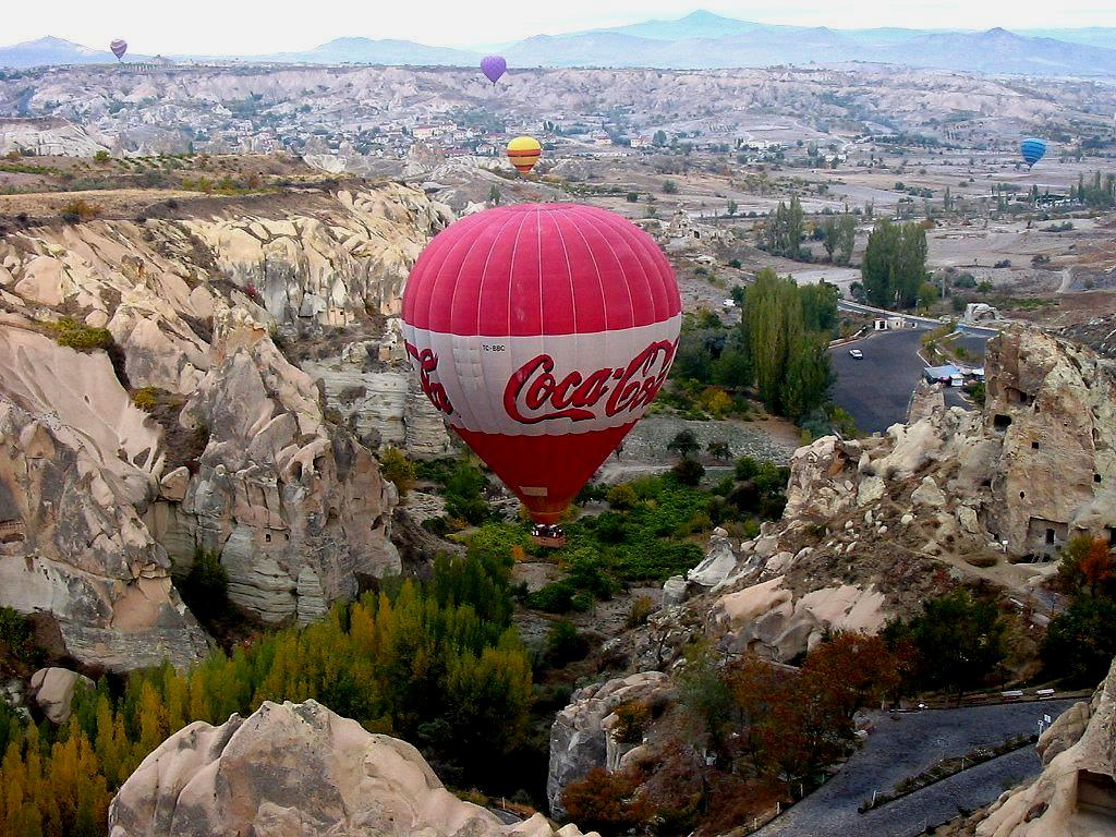 A kappadókiai táj légballonról Göreme település felett (Törökország)